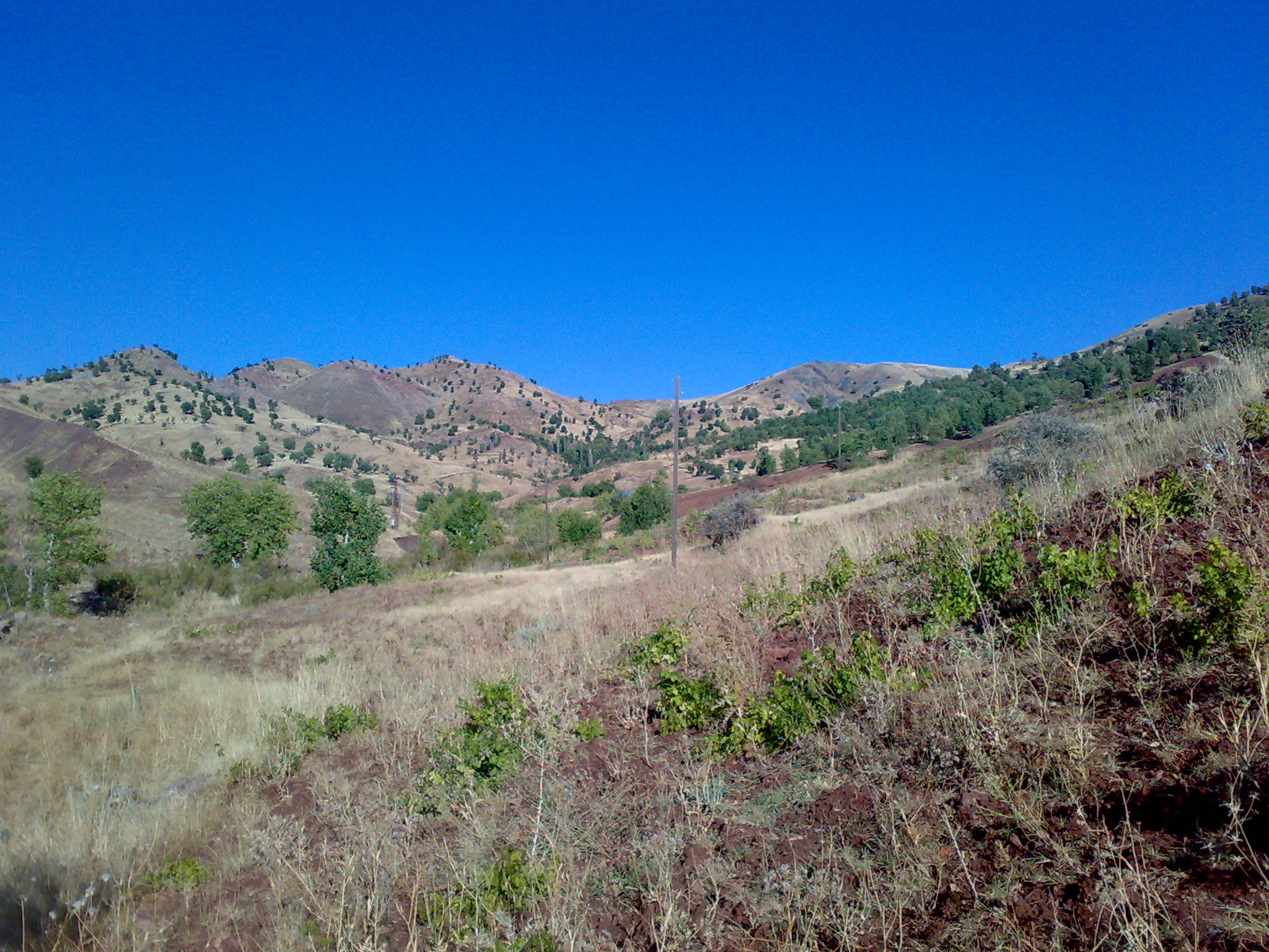 Adıyaman merkeze bağlı Sakallı köyünden bir görüntü.